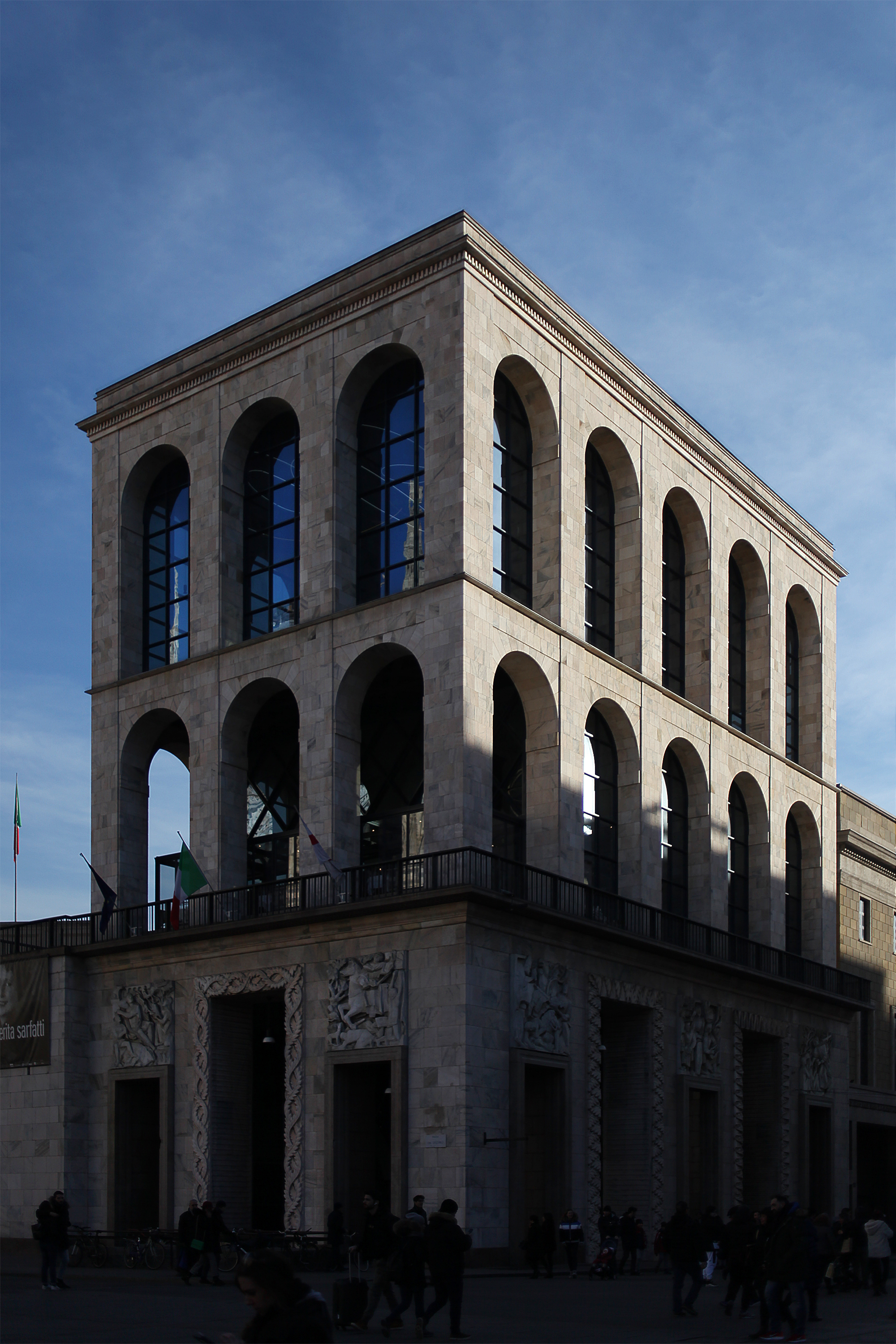 Il Palazzo dell'Arengario di Milano nella parte che ospita il Museo del Novecento